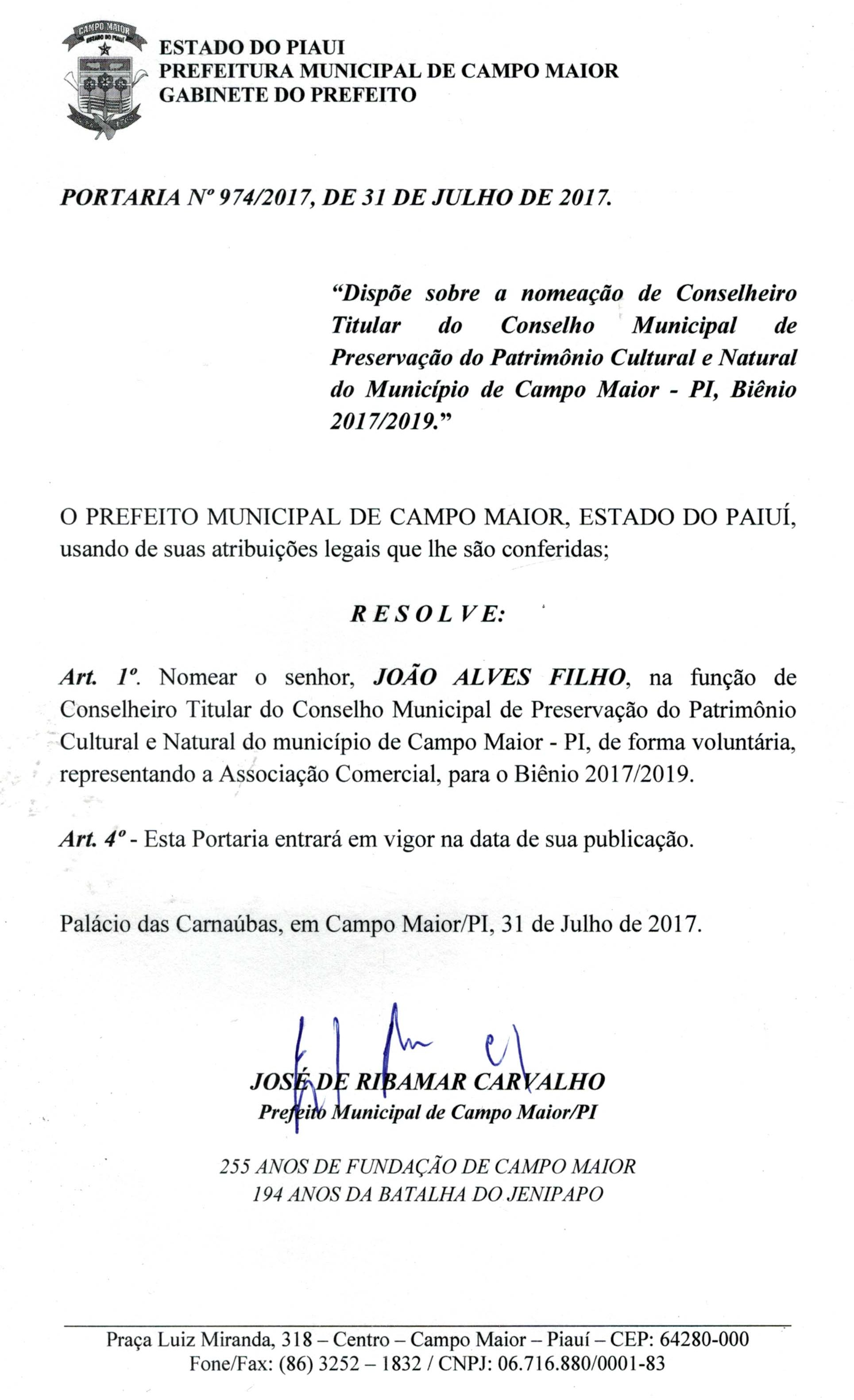 Portaria em que o município de Campo Maior nomeia conselheiro de órgão local.